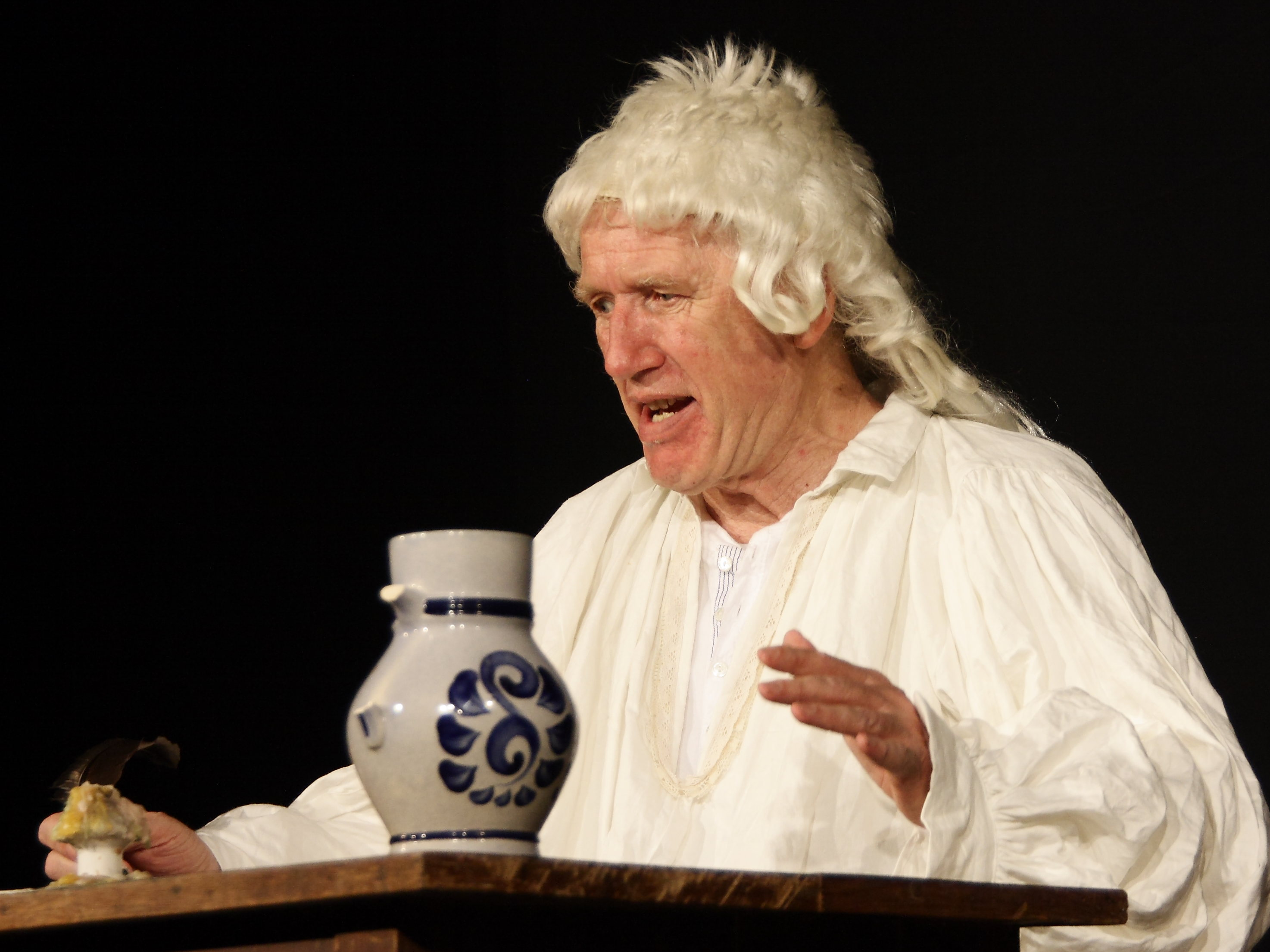 Die Schwabenoffensive mit ihrem Programm zum 25-jährigen Jubiläum Komm Du bloß hoim! Reloaded im Kult, Niederstetten.